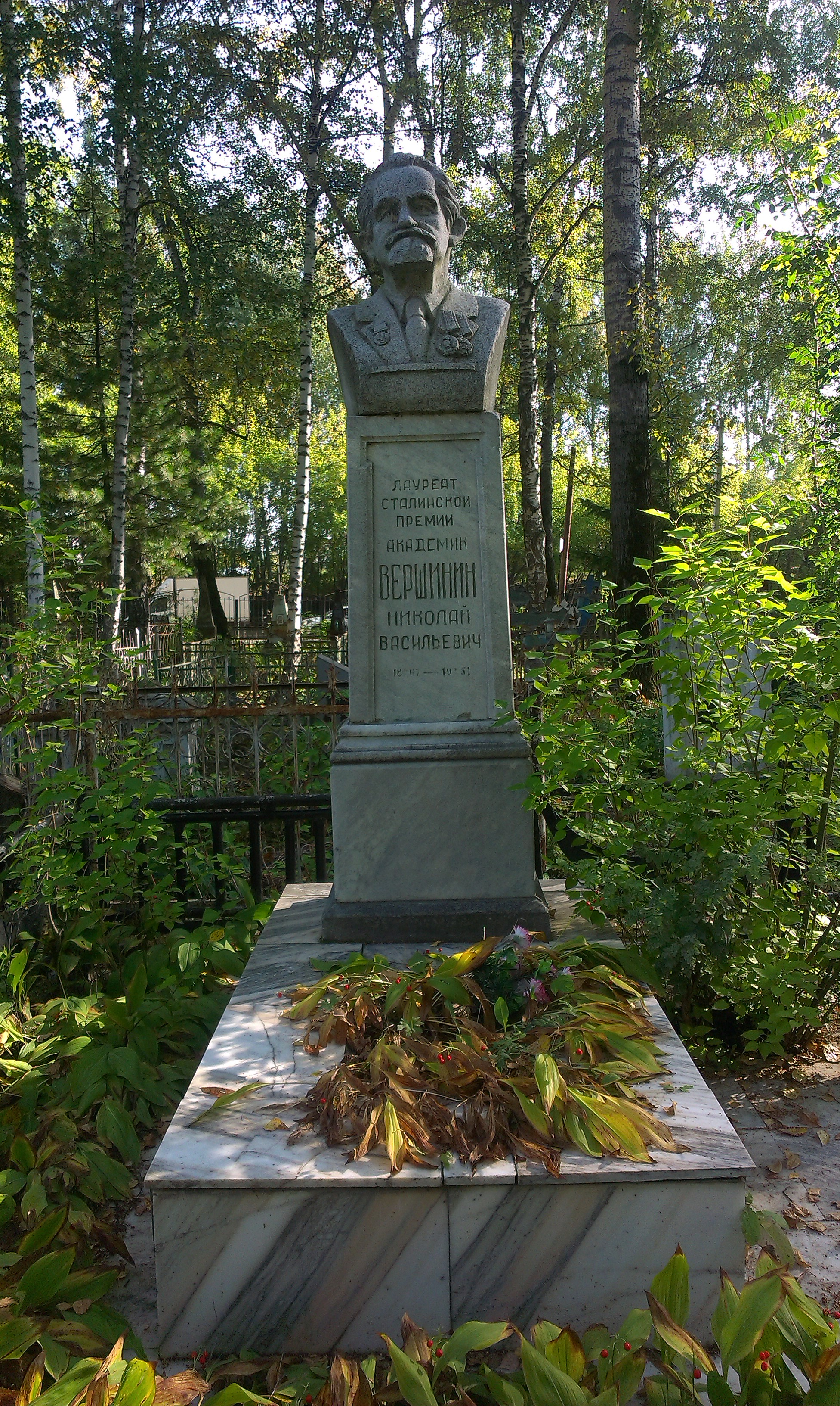 Южное кладбище Томска